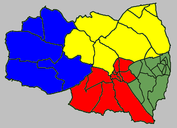 中文（台灣）: 楊梅市次分區圖。